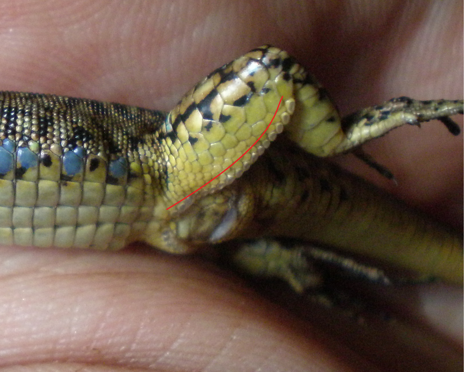 Podarcis hispanica, lagartija ibérica, y mano del Tiu Cancho